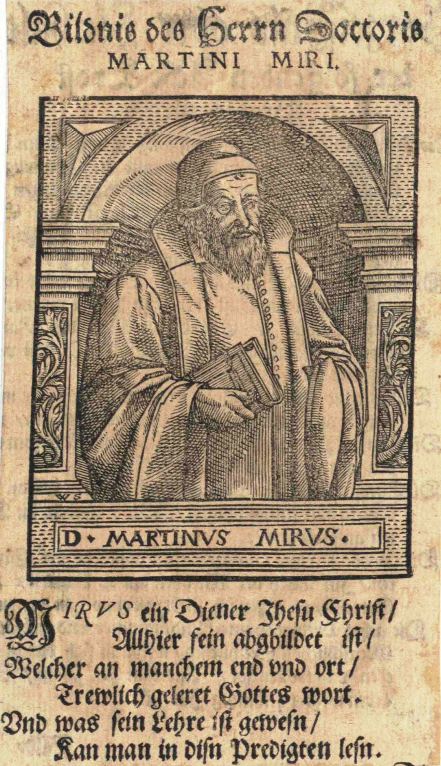 Martin Mirus (1532–1593), Hofprediger in Dresden